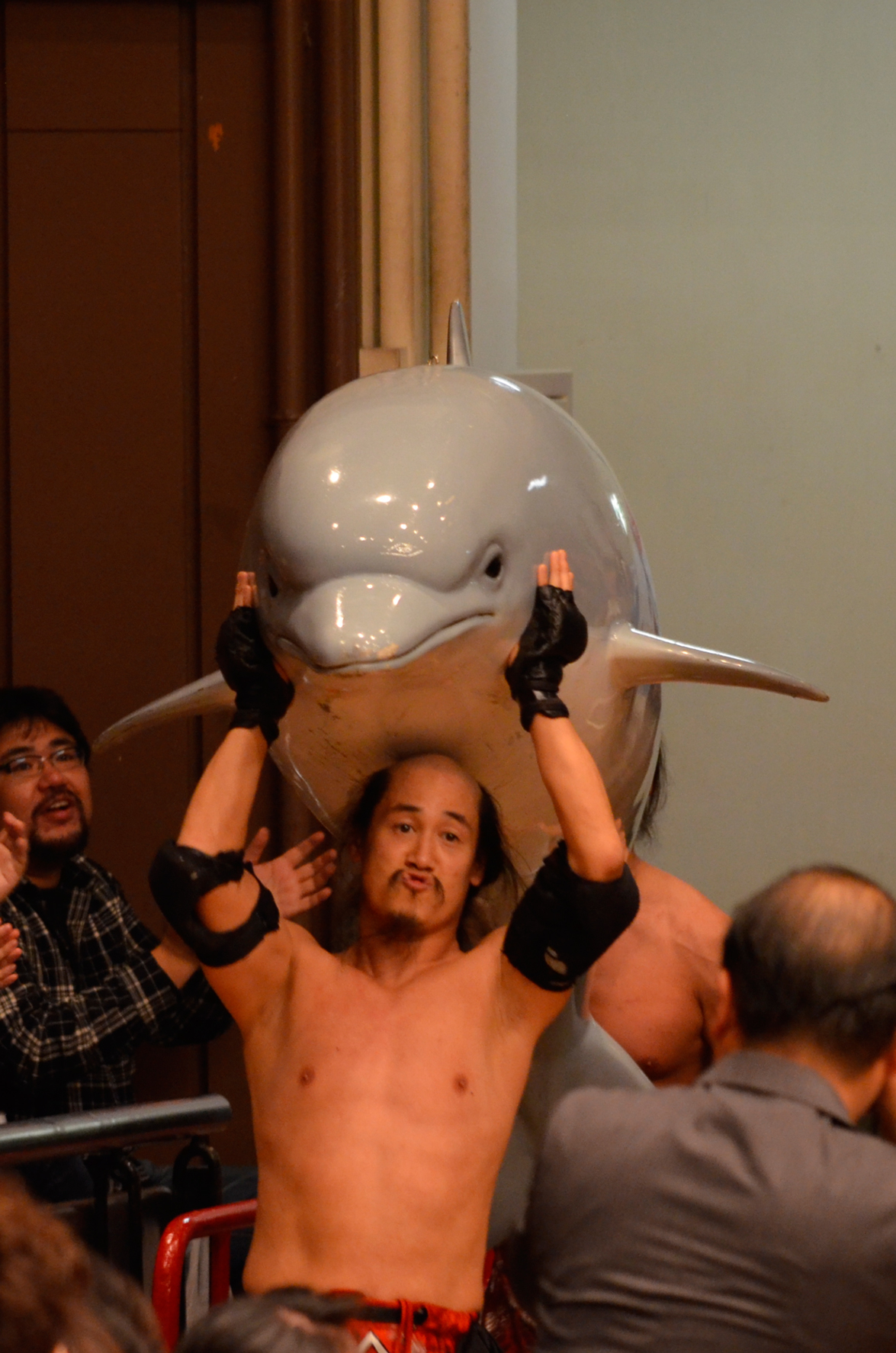 生態兵器なごり雪